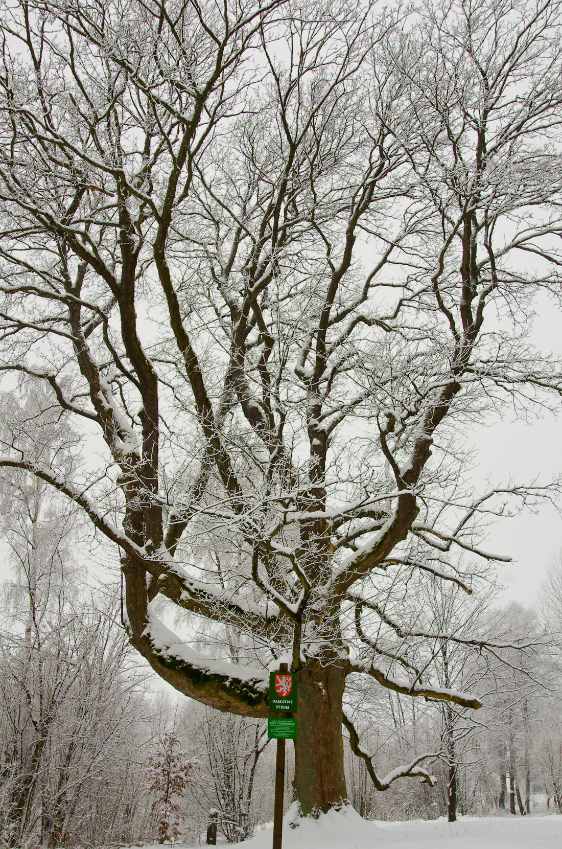 památný strom - Klen v Mezihorské, Krušné hory, okres Sokolov